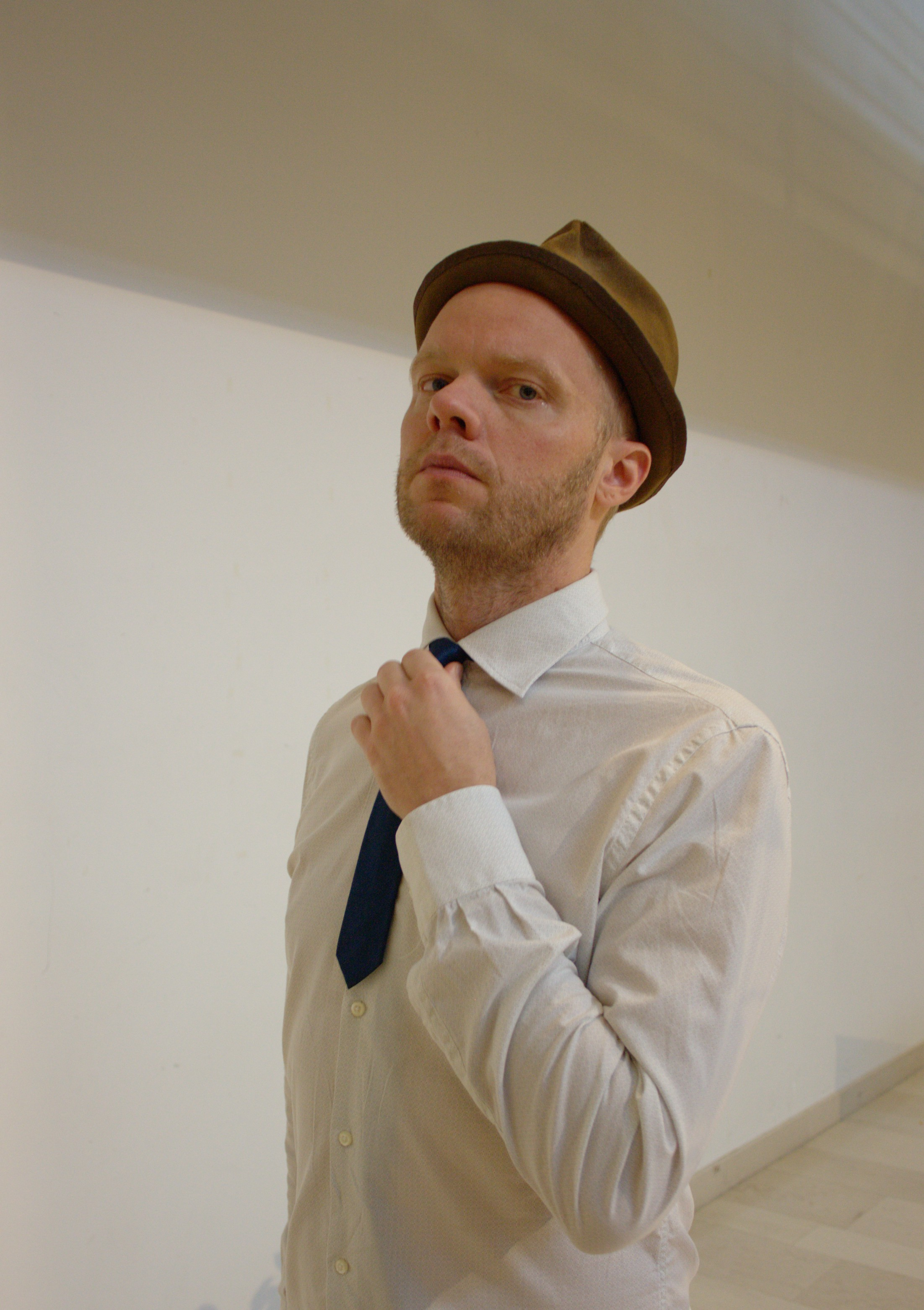 Olof Wretling i Kultur på campus. Fotat i samband med hans berättelse "Misslyckandena i mitt Liv".